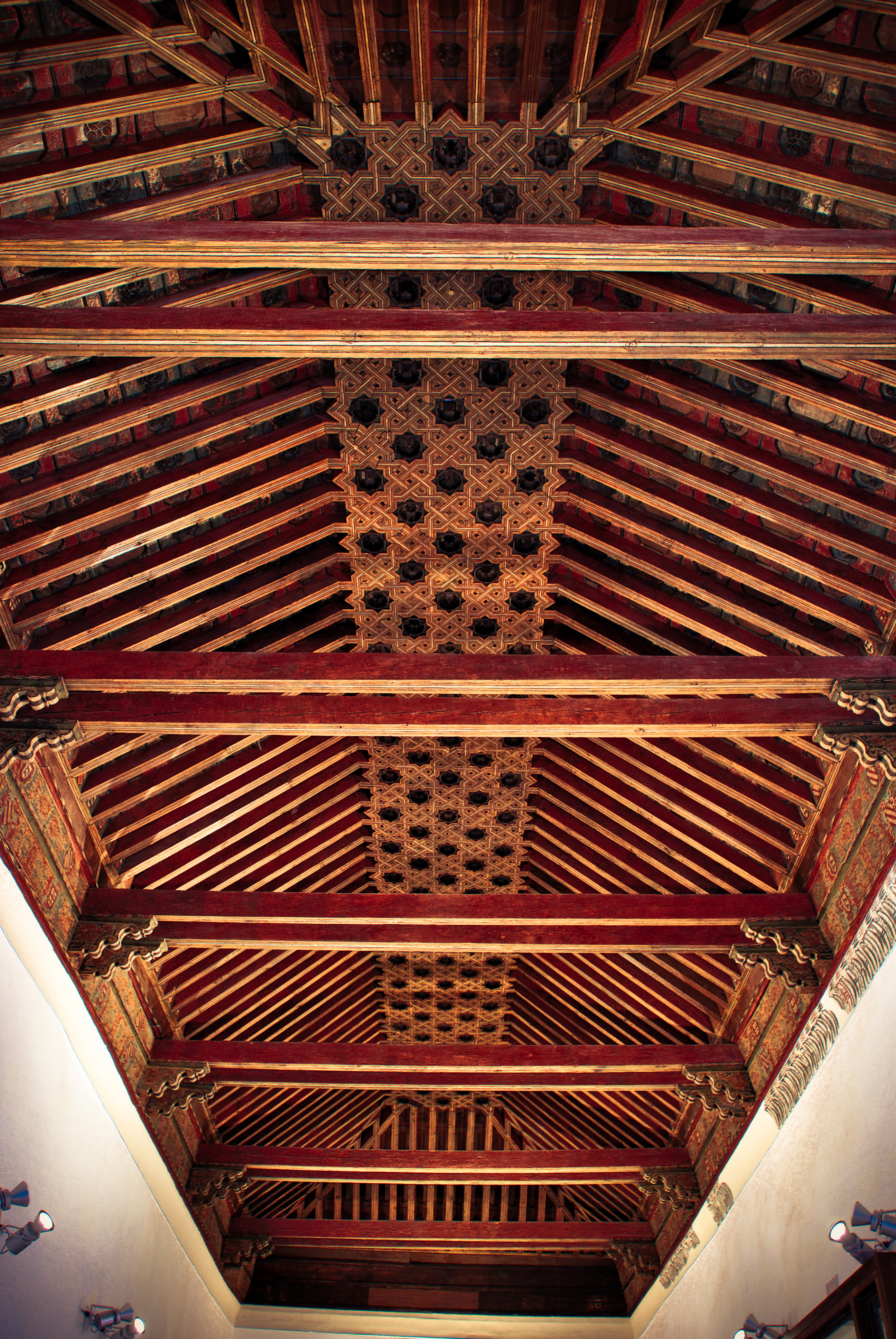 Palacio de Fuensalida.